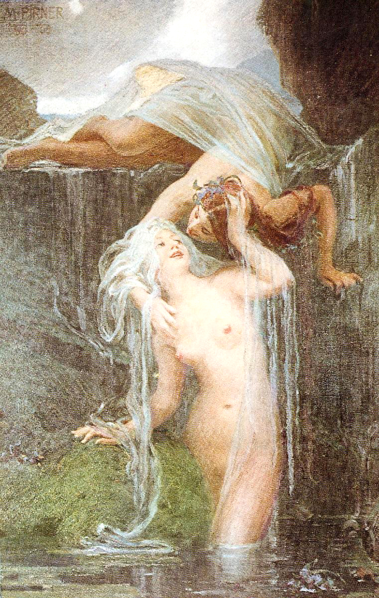 Potok (1903)